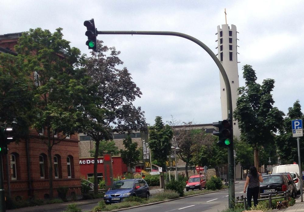 Heilig-Geist-Kirche, Hanau